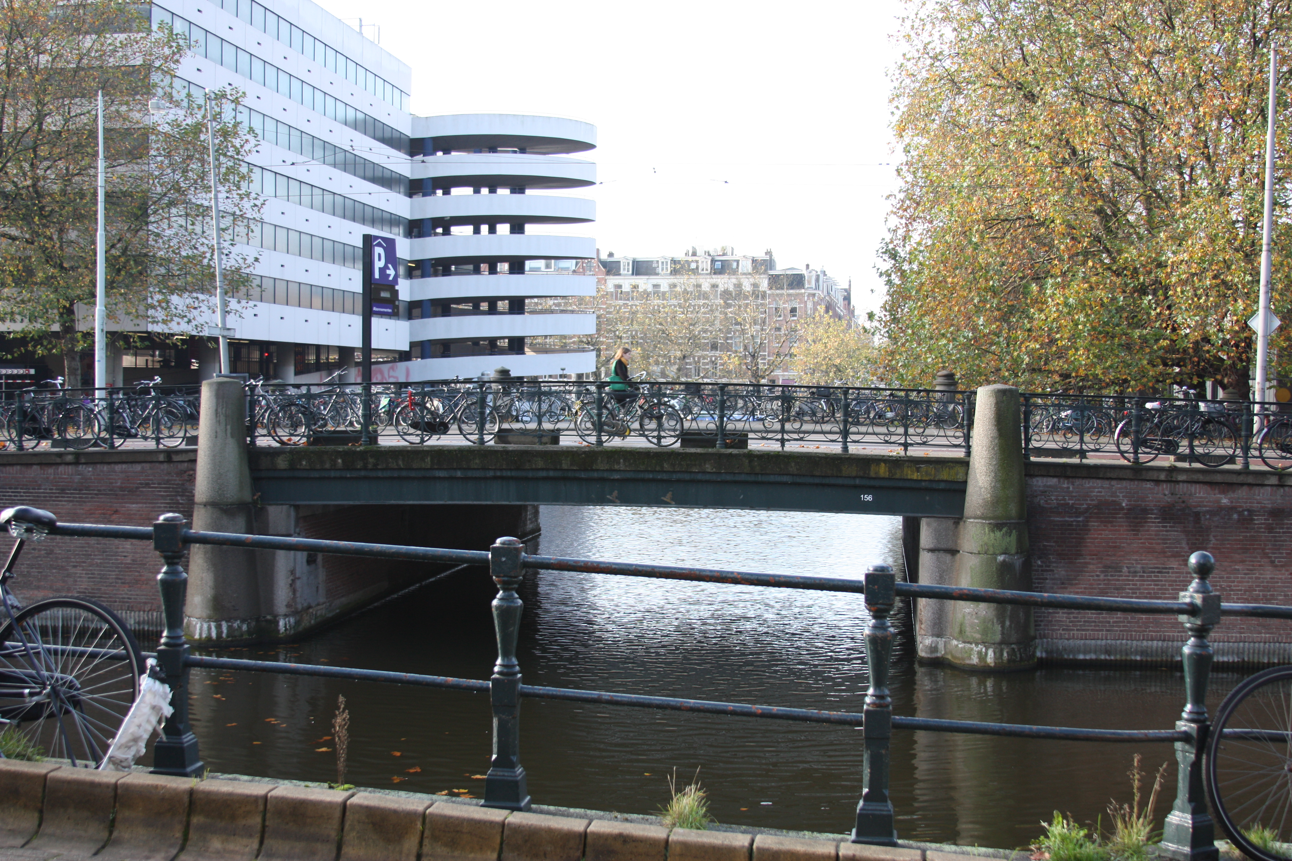 Amsterdam Zentrum